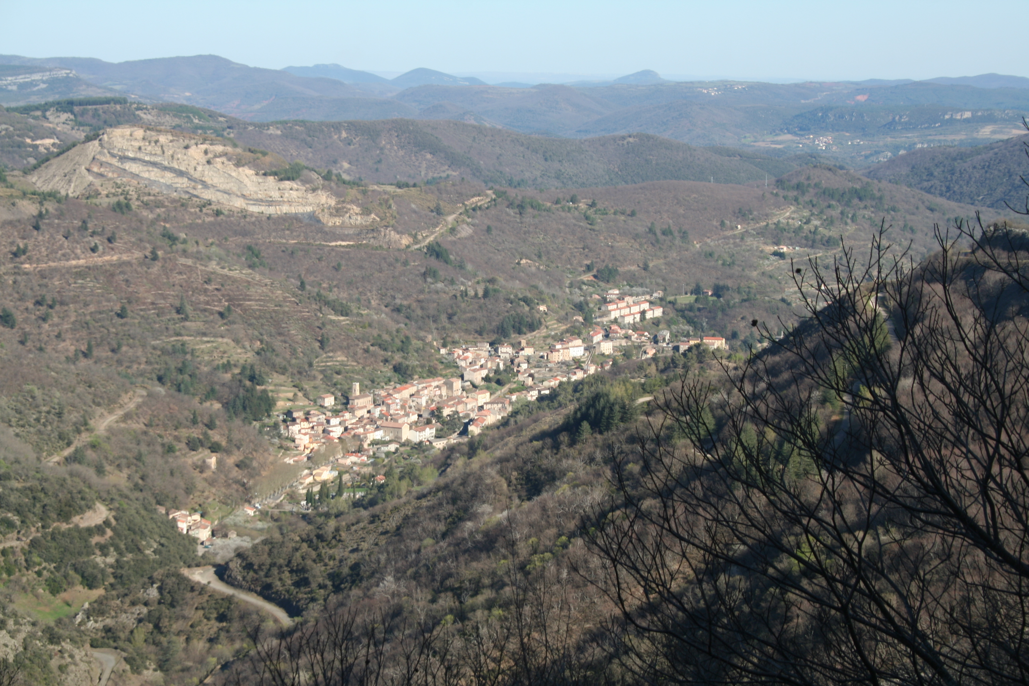 Graissessac (Hérault) - vue générale prise en descendant du Col du Layrac. En arrière plan, le Pic de Vissou.